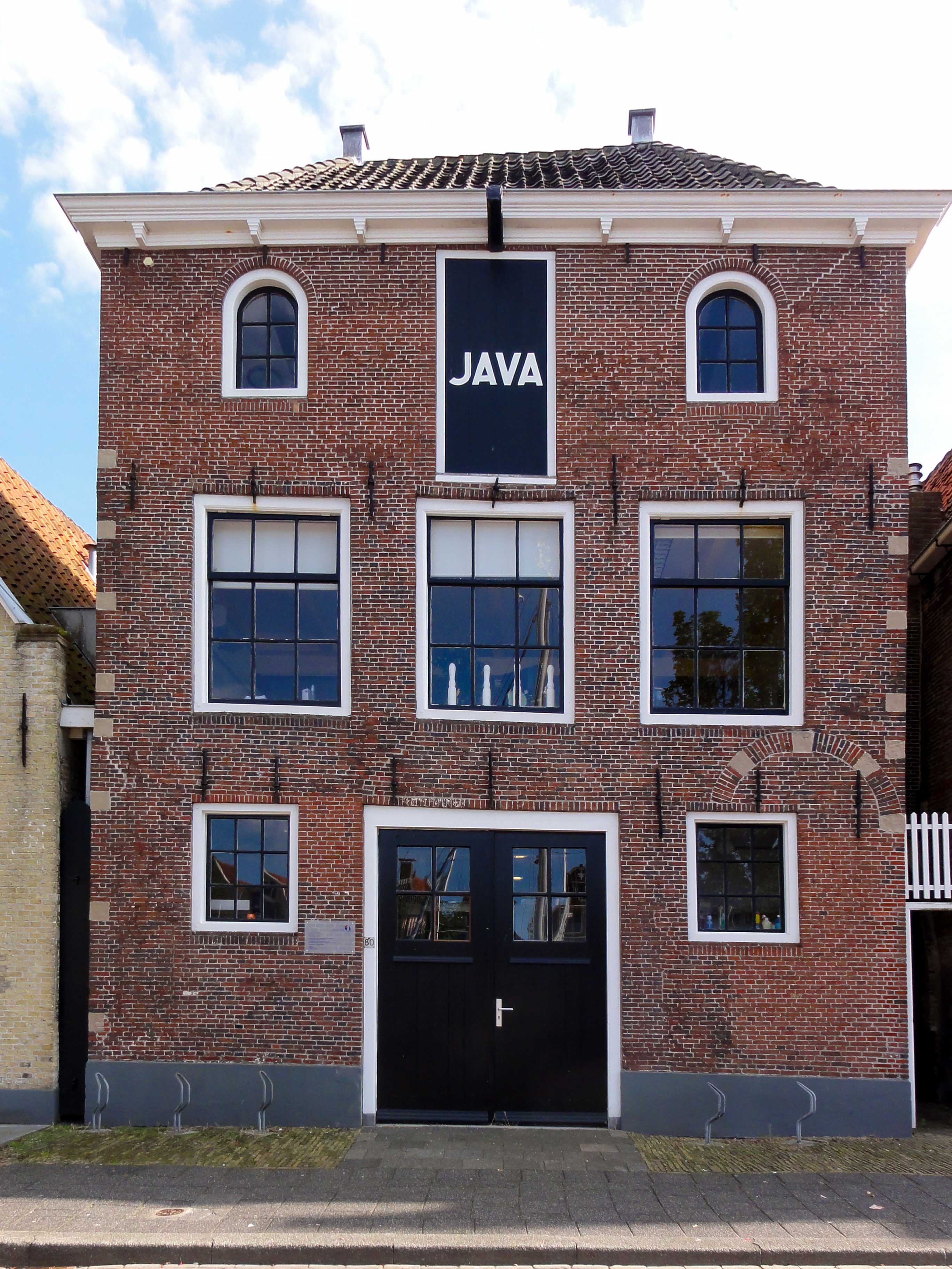 Java Noorderhaven 80 in Harlingen